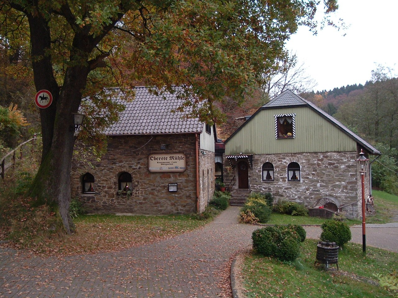 Oberste Mühle in Radevormwald Fotografiert von Benutzer:Taube Nuss im Oktober 2004 "Lizenz GNU FDL"